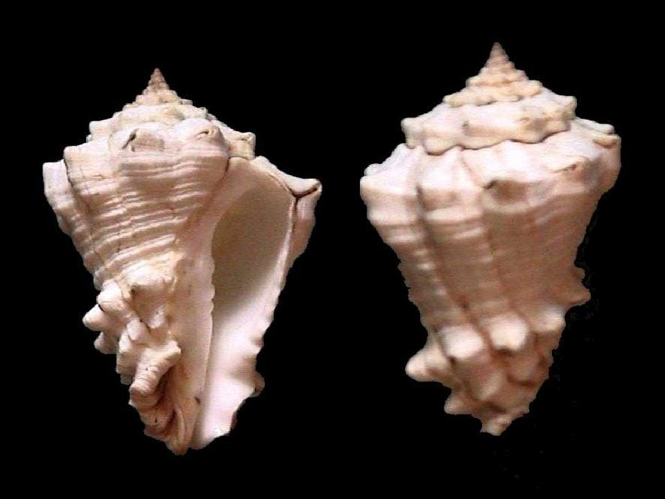 Vasun muricatum del Archipiélago Los Roques, Dependencias Federales - Venezuela.